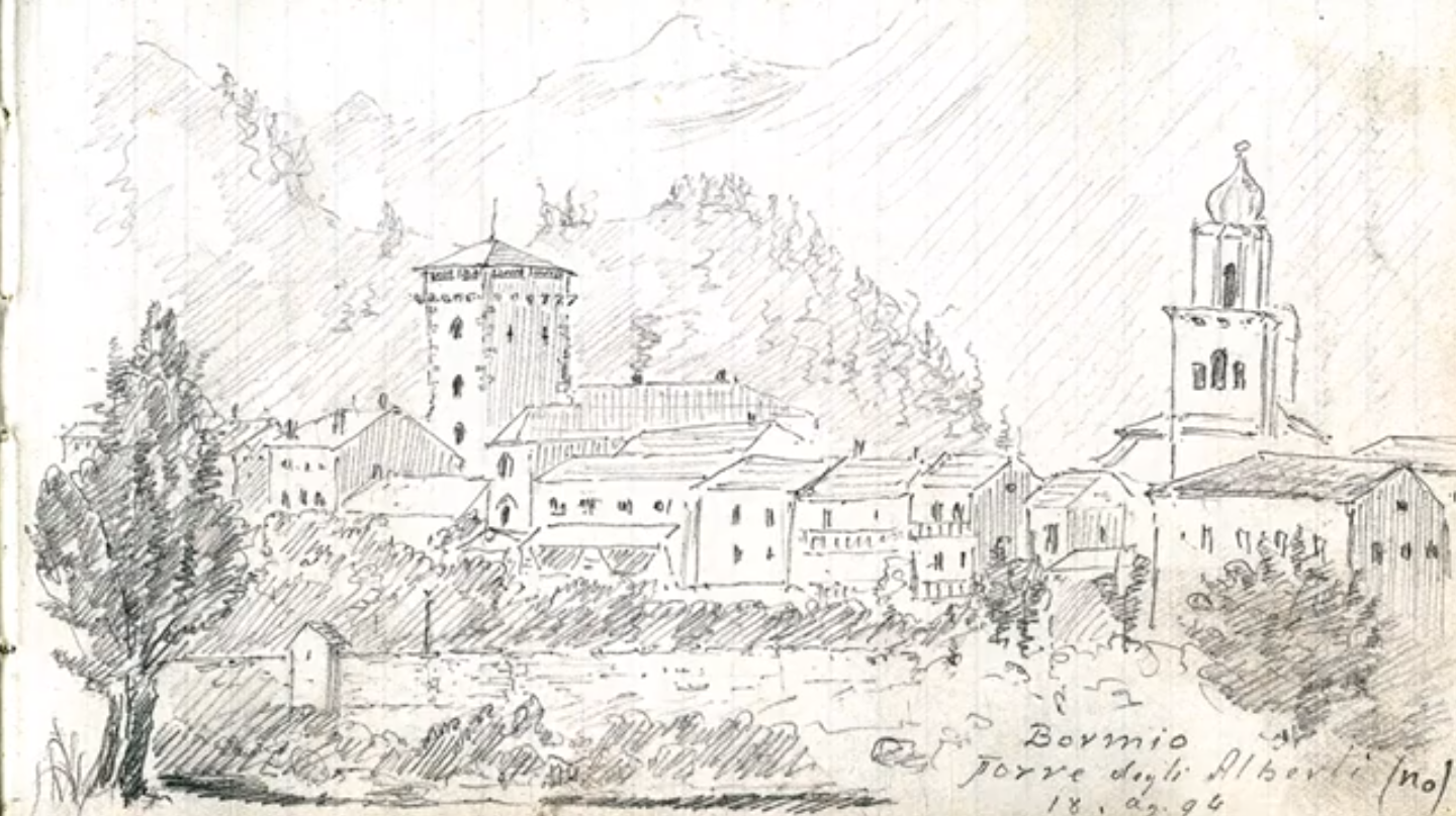 Torre degli Alberti a Bormio. Disegno di Enrico Alberto d'Albertis tratto dai taccuini di viaggio del Capitano Enrico d'Albertis - Cure termali a Bormio 1894. Opera conservata dal Museo delle Culture del Mondo di Castello D’Albertis di Genova.